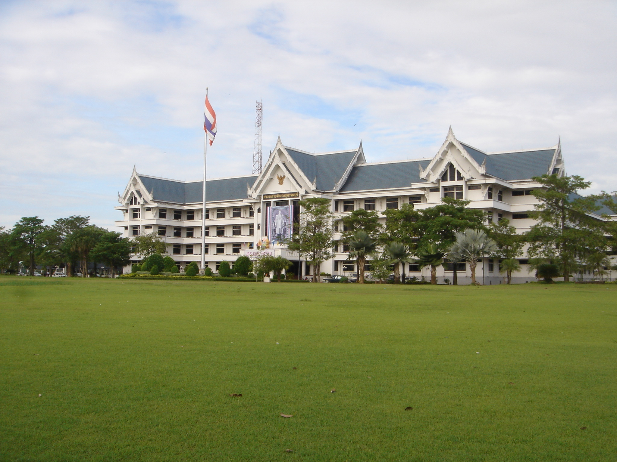 ศาลากลางจังหวัดสุพรรณบุรี ศูนย์ราชการ ทางหลวงแผ่นดินหมายเลข 340 (บางบัวทอง-ชัยนาท)